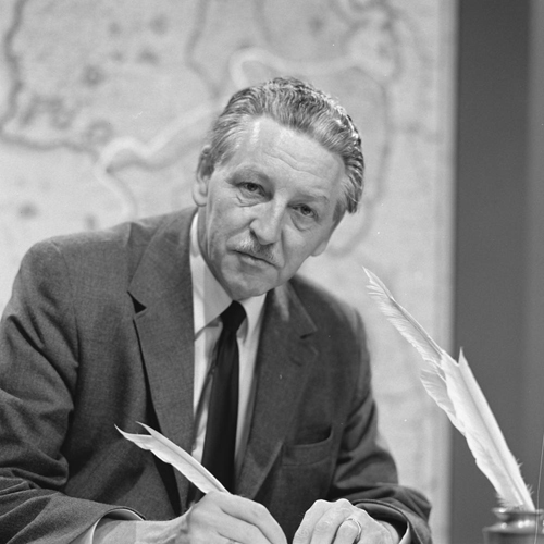 Joop Reinboud in 300 jaar geleden.